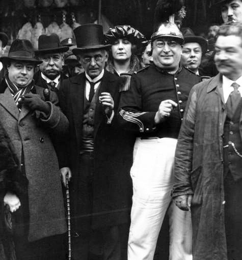 L'illustrateur français Jules Depaquit (avec la canne en bambou), maire de la Commune libre de Montmartre, en visite à Paris en 1921.